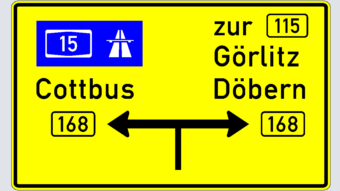 Neue Wegweiser zwischen Cottbus und Döbern